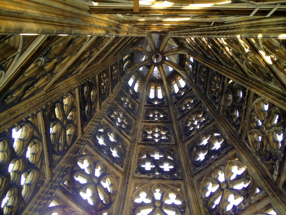 Cologne